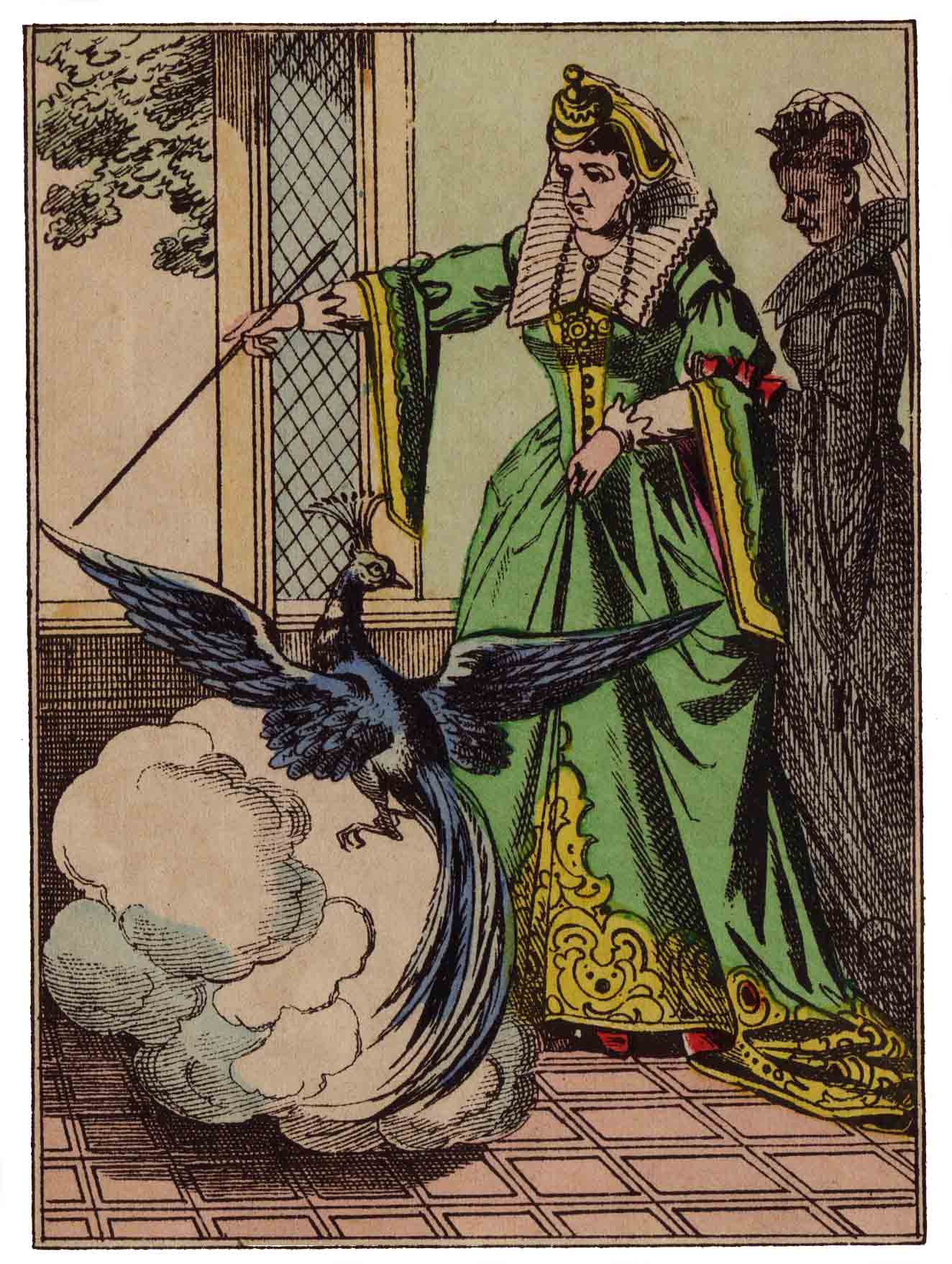 Images d'Épinal : L’Oiseau bleu